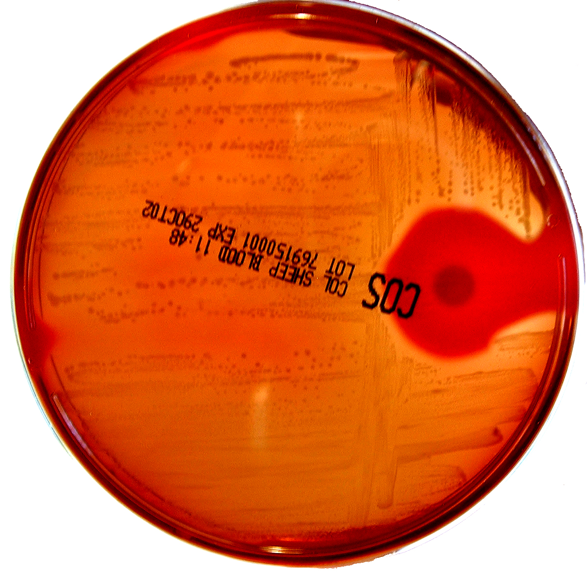 Test à la bacitracine sur une souche de S.pyogenes (image personnelle) Philippinjl 8 novembre 2005